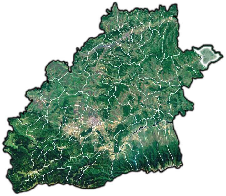 Bradeni jud Sibiu.